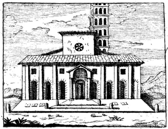 La facciata gotica di Santa Maria in Cosmedin, prima del restauro in stile rococò del 1718